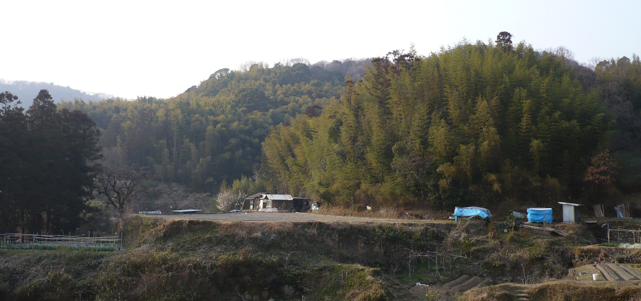 芥川山城のあった山(中央奥)を南東から望む。